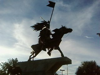 Statue équestre visible à San Martin (Meta, Colombia)